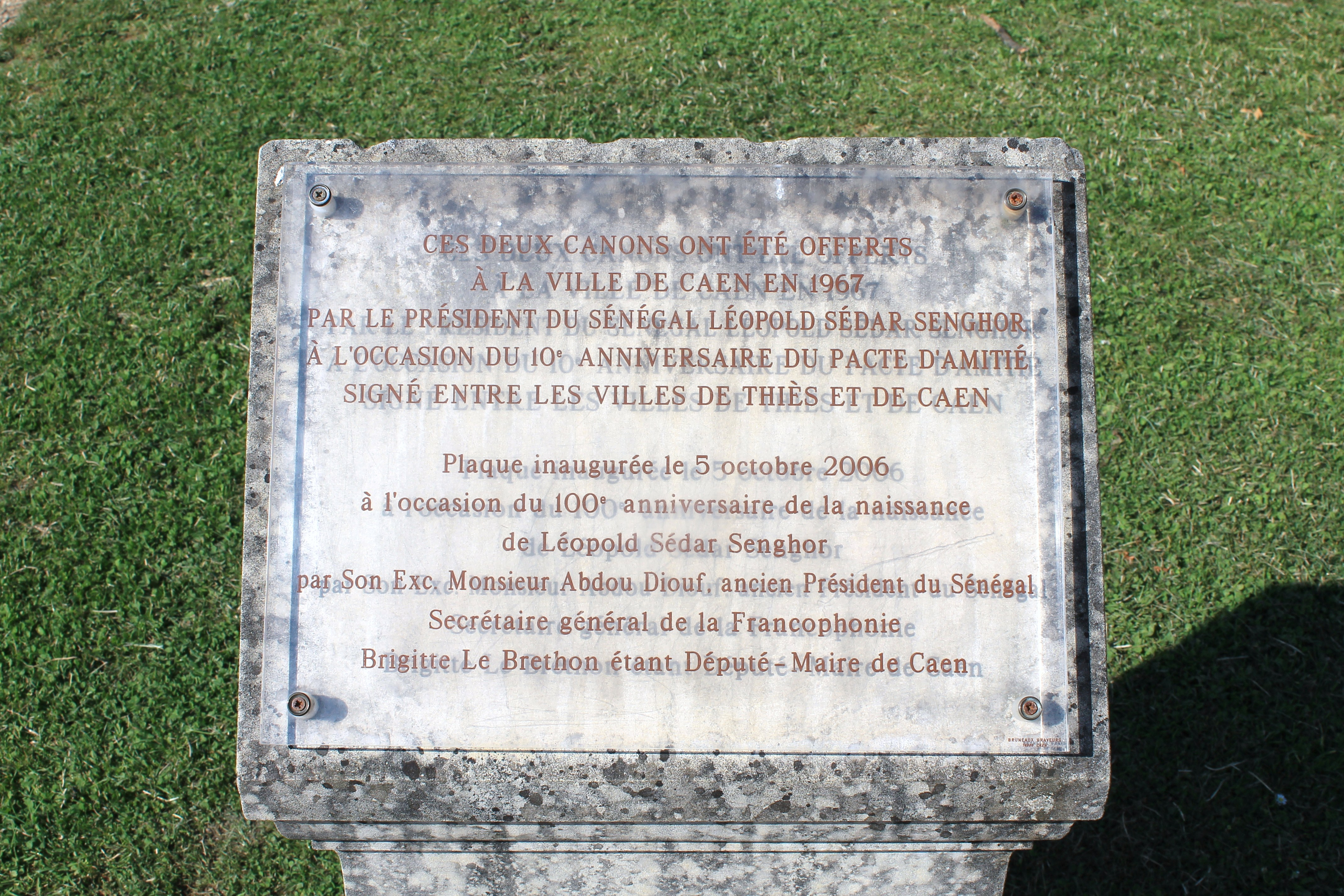 Plaque à la mémoire de Léopold Sédar Senghor dans l'enceinte du Château de Caen (Calvados). Plaque inaugurée le 5 octobre 2006 à l'occasion du 100e anniversaire de Plaque à la mémoire de Léopold Sédar Senghor par son Exc. Monsieur Abdou Diouf, ancien président du Sénégal, secrétaire générale de la Francophonie. Brigitte Le Brethon étant Député-Maire de Caen.